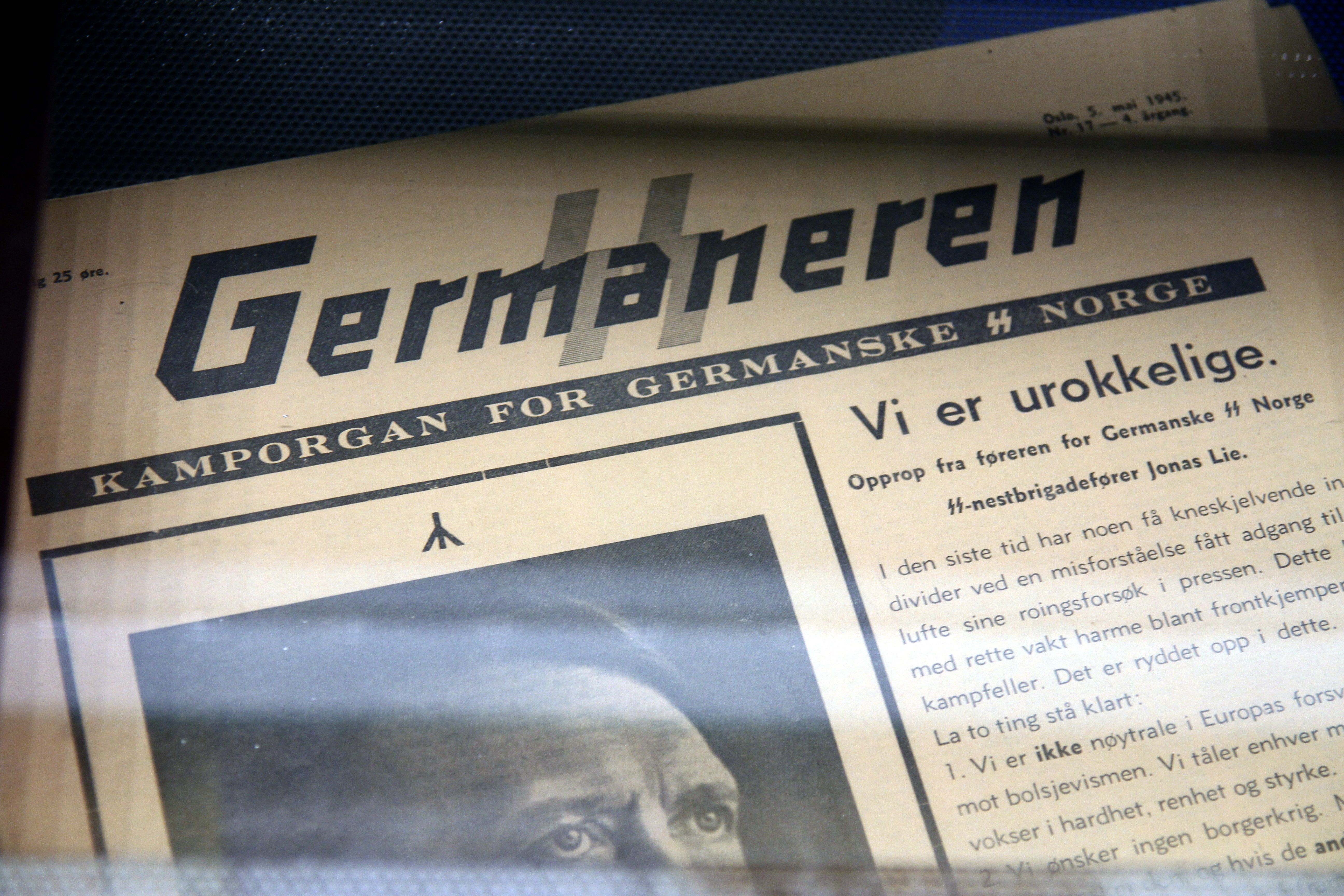 Germaneren (Germanske SS-Norges avis), 5. mai 1945. På utstilling hos Senter for studier av Holocaust og livssynsminoriteter.